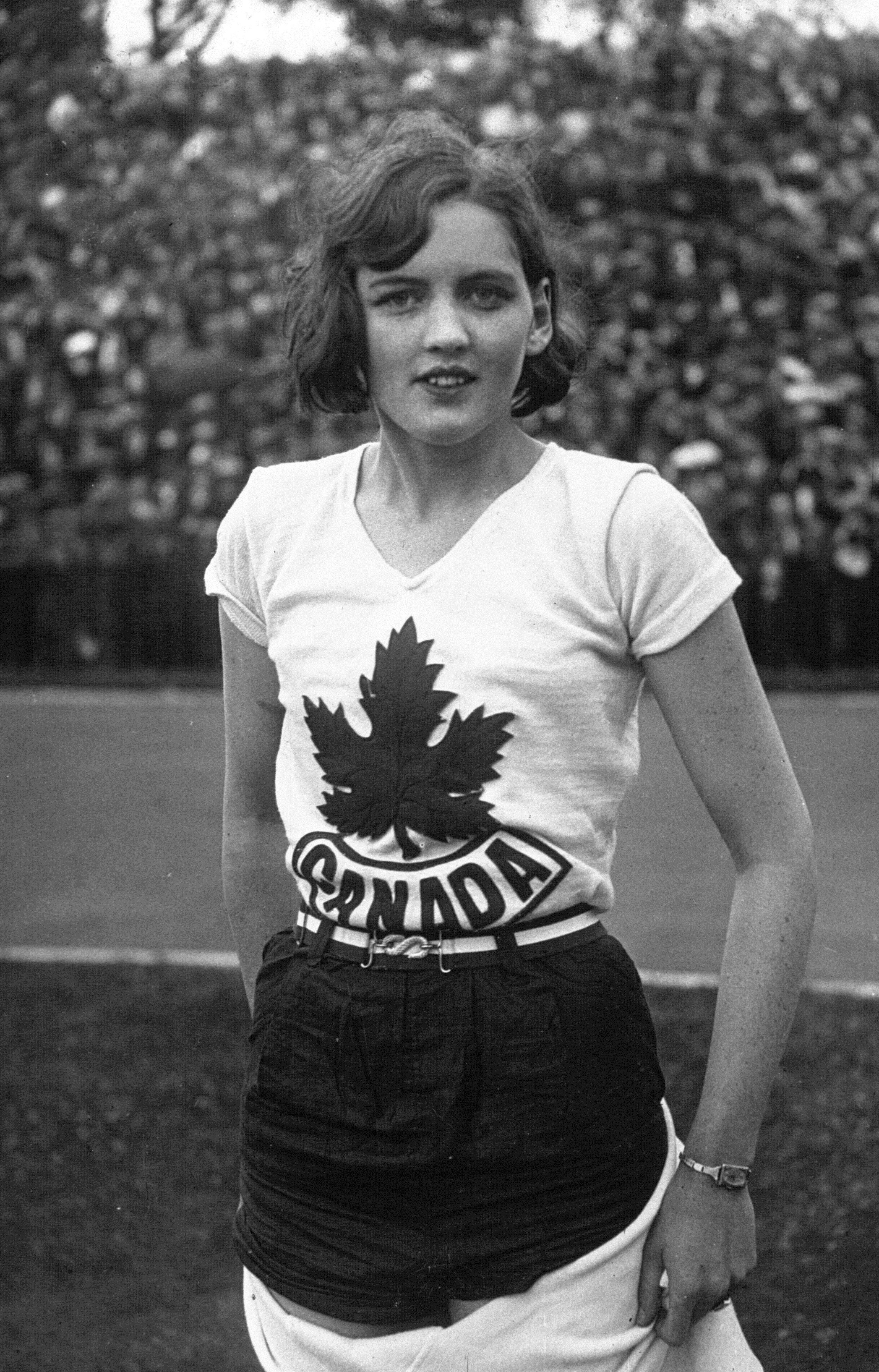 Colombes : meeting des champions : Caterwood, championne olympique saut hauteur (portrait).